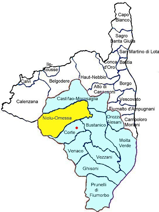 Canton de Niolu-Omessa, Haute-Corse. Canton électoral actuel, à cheval sur Golu. Comprenant le Niolu et un bout de Castagniccia (morceau de Tàlcini dont son chef-lieu Omessa). Regroupe électoralement les anciens cantons de Omessa et de Calacuccia. Corsu: Ghjura eletturale, Golu da fiume in qua è da fiume in da. Niolu cu un pezzu di Castagniccia (pieve di Tàlcini). Vecchji cantoni di Omessa è di Calacuccia.